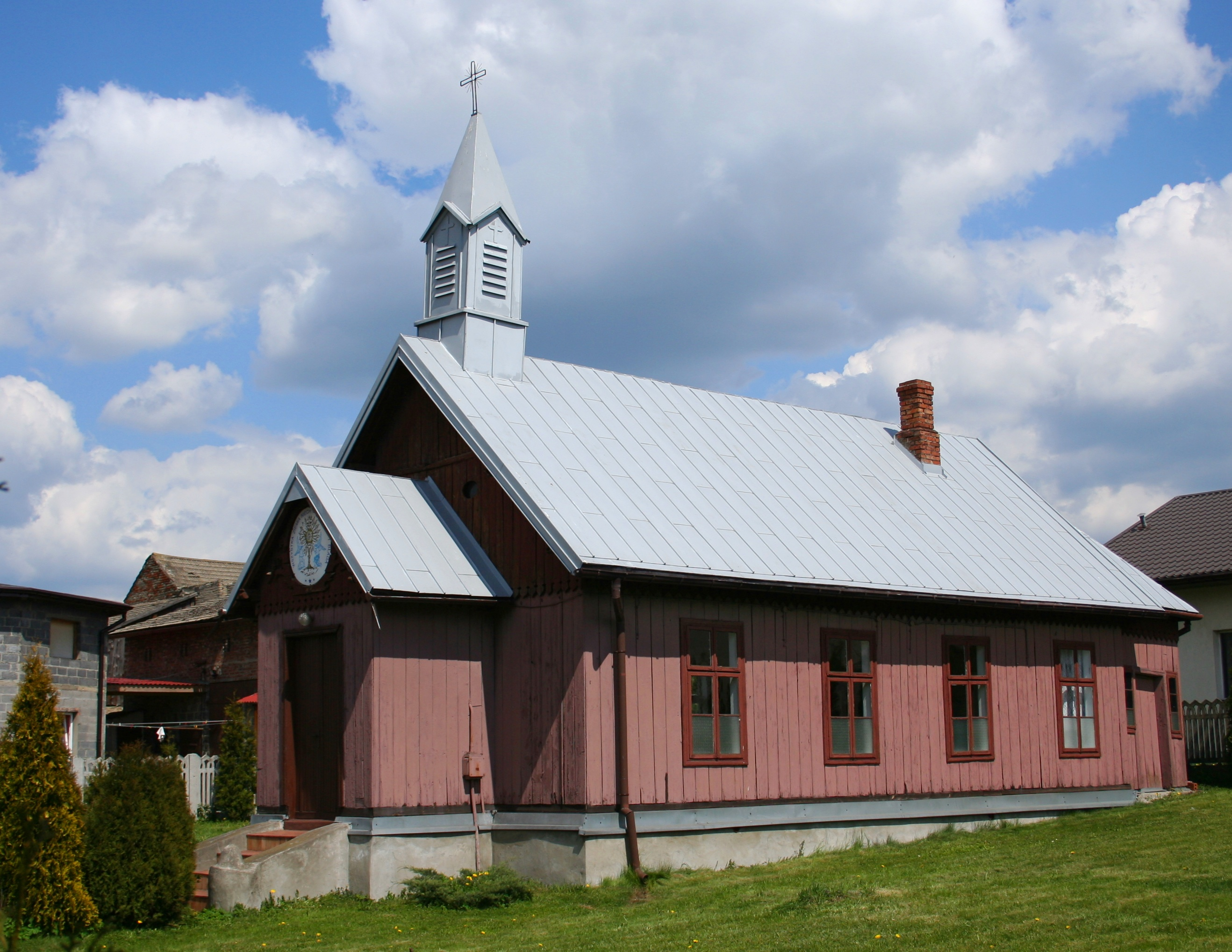 Kościół Mariawitów w Koziegłowach, Polska, województwo śląskie, powiat myszkowski